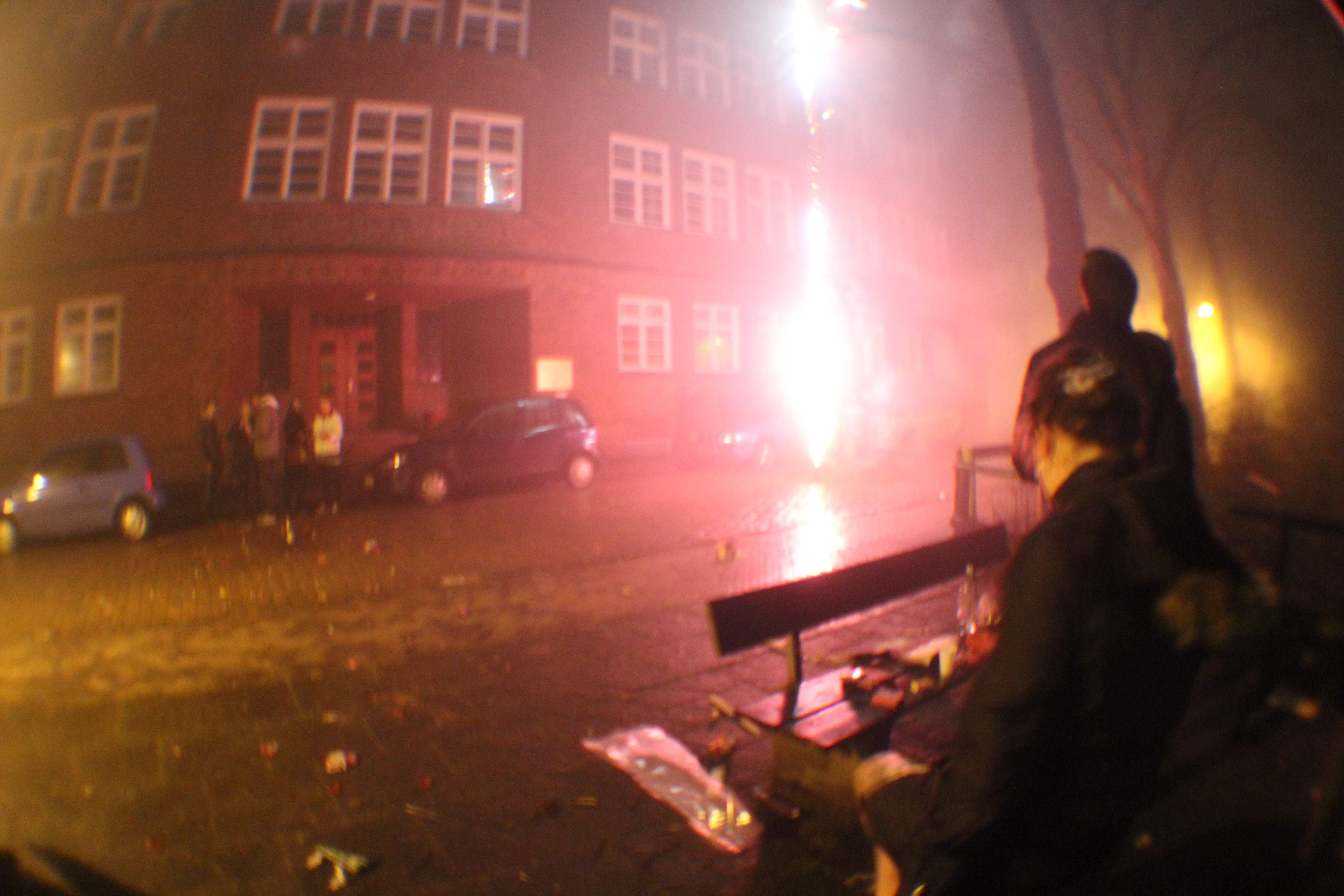 Silvester von 2011 auf 2012 bei der Schloss-Duburg-Schule (Schloßgrund der Duburg, Flensburg), Bild 002